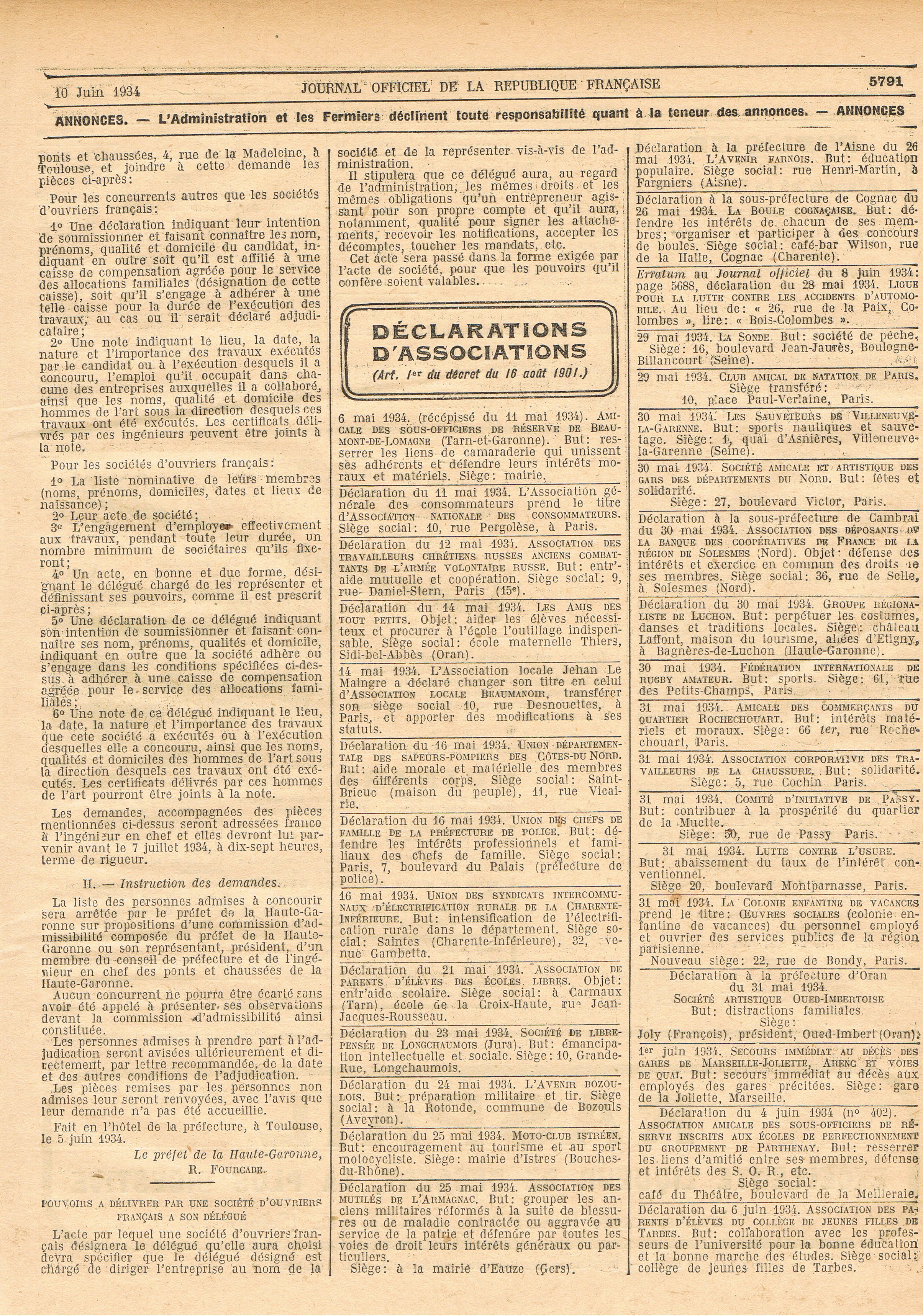 Extrait du Journal Officiel de la République Française du 10 Juin 1934